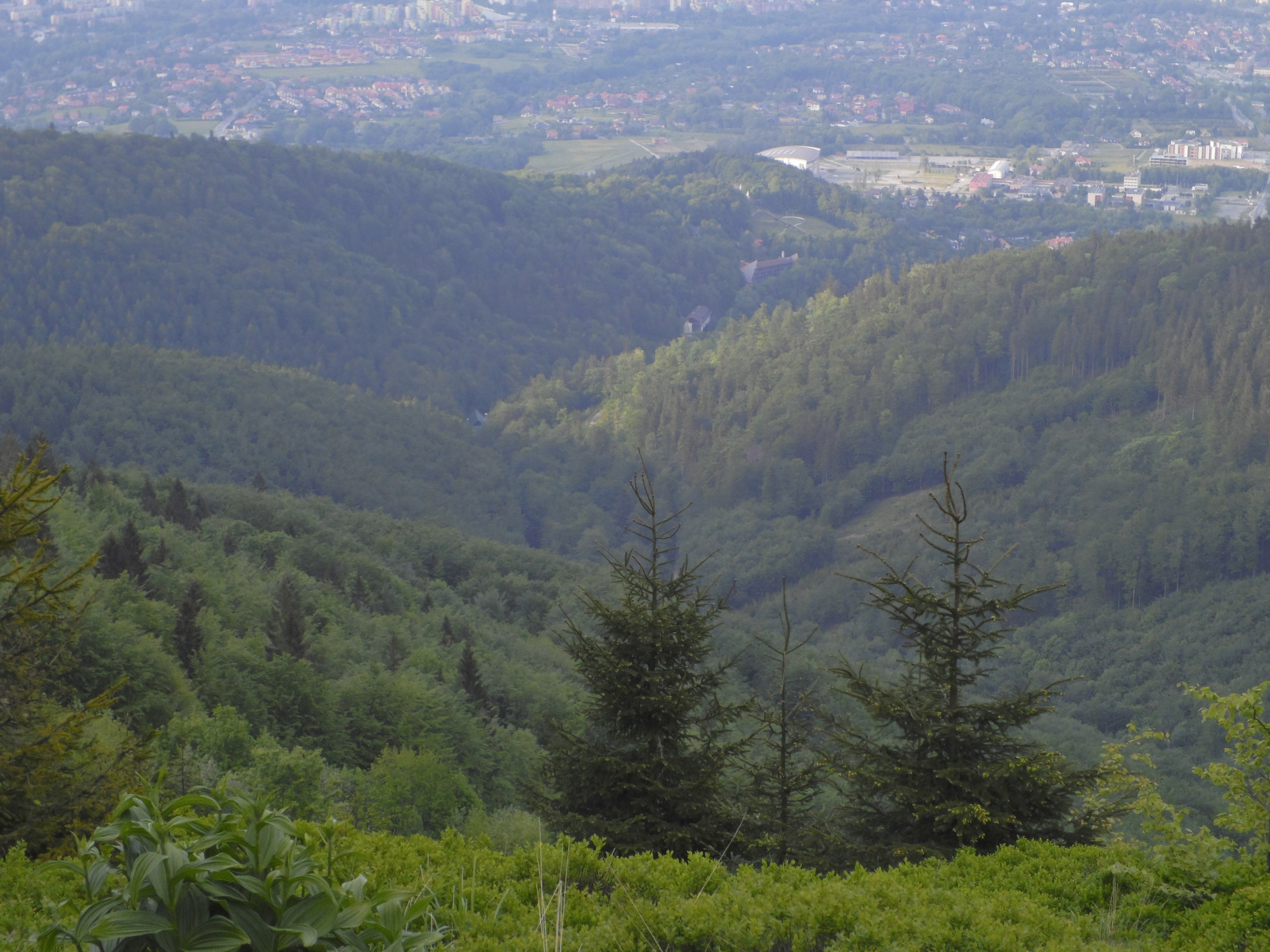 Specjalny obszar ochrony siedlisk Beskid Śląski. This is a photography of Natura 2000 protected area with ID PLH240005